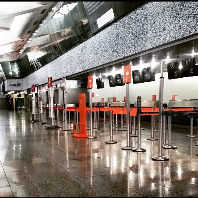 Português do Brasil: 14 Balcões de check-in